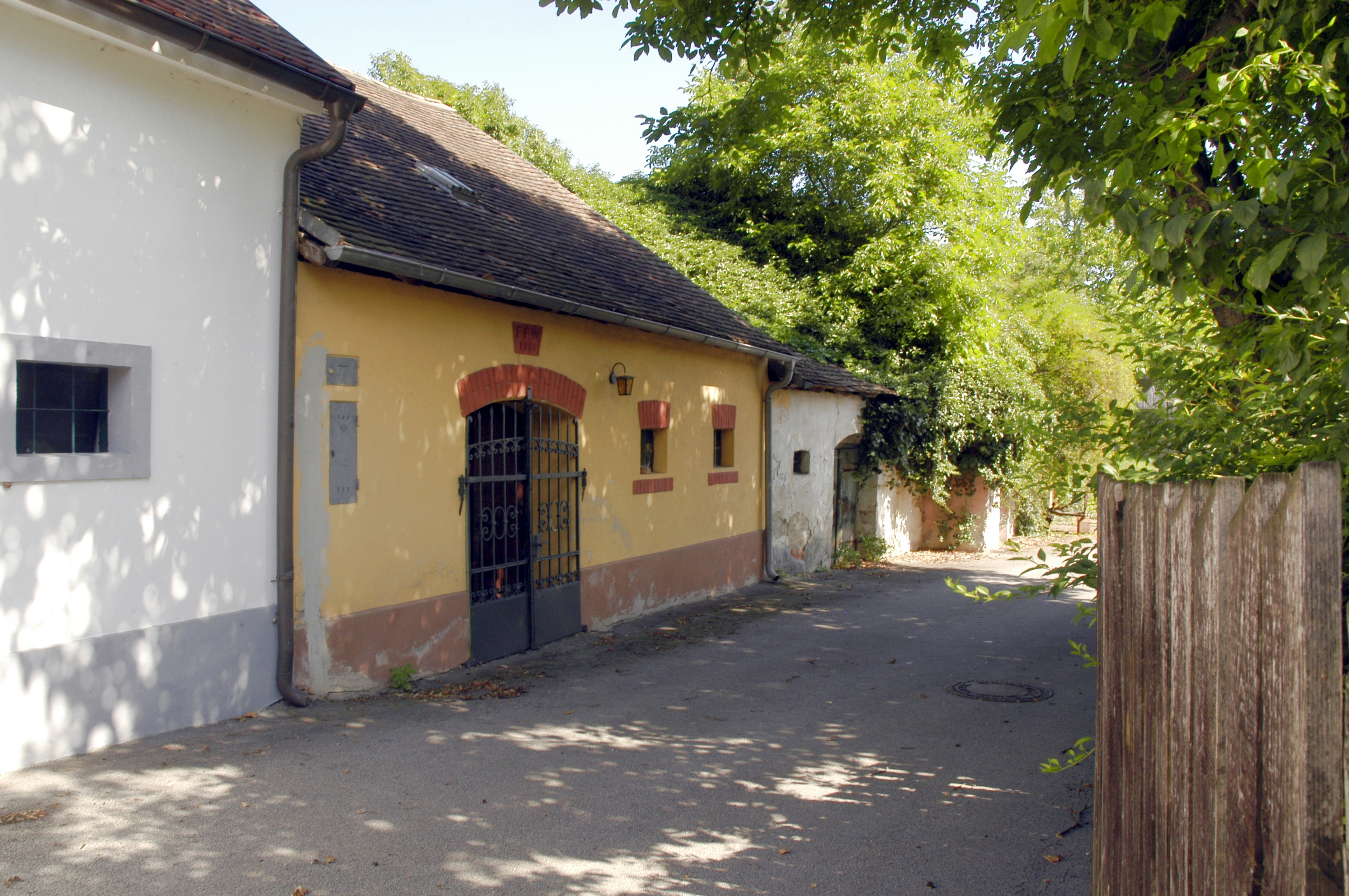 Objekte in der Kellergasse Rondelle in Deinzendorf, Gemeinde Zellerndorf, Niederösterreich